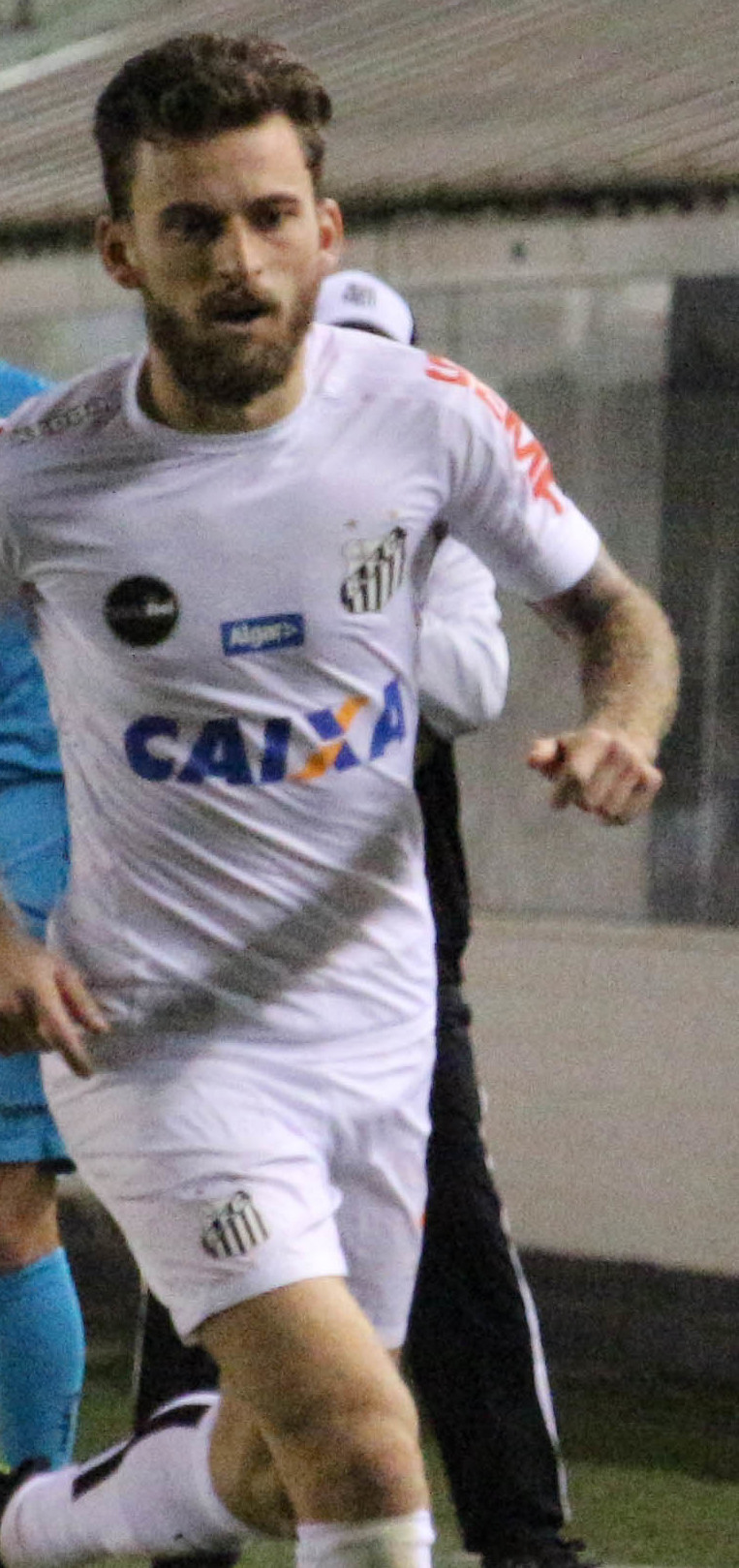 Foto: Douglas Teixeira/Futebol Santista